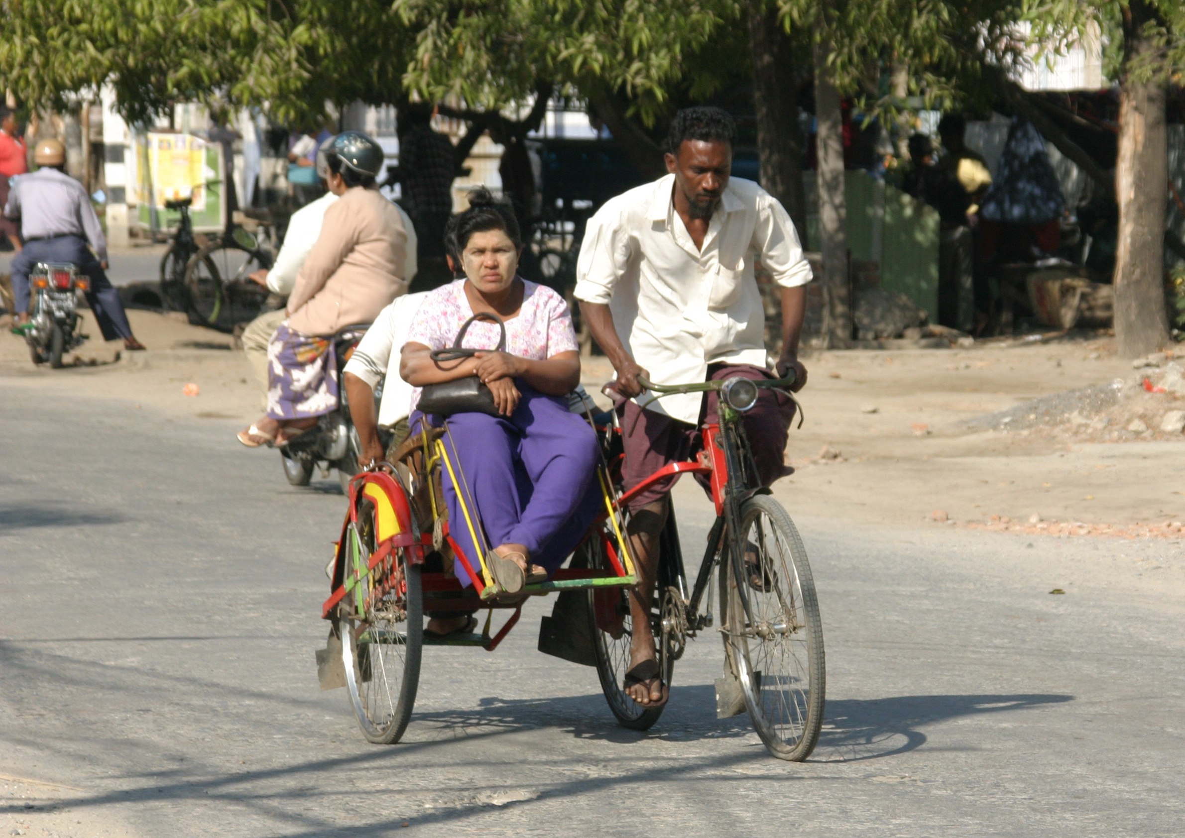 Transport in Mandalay